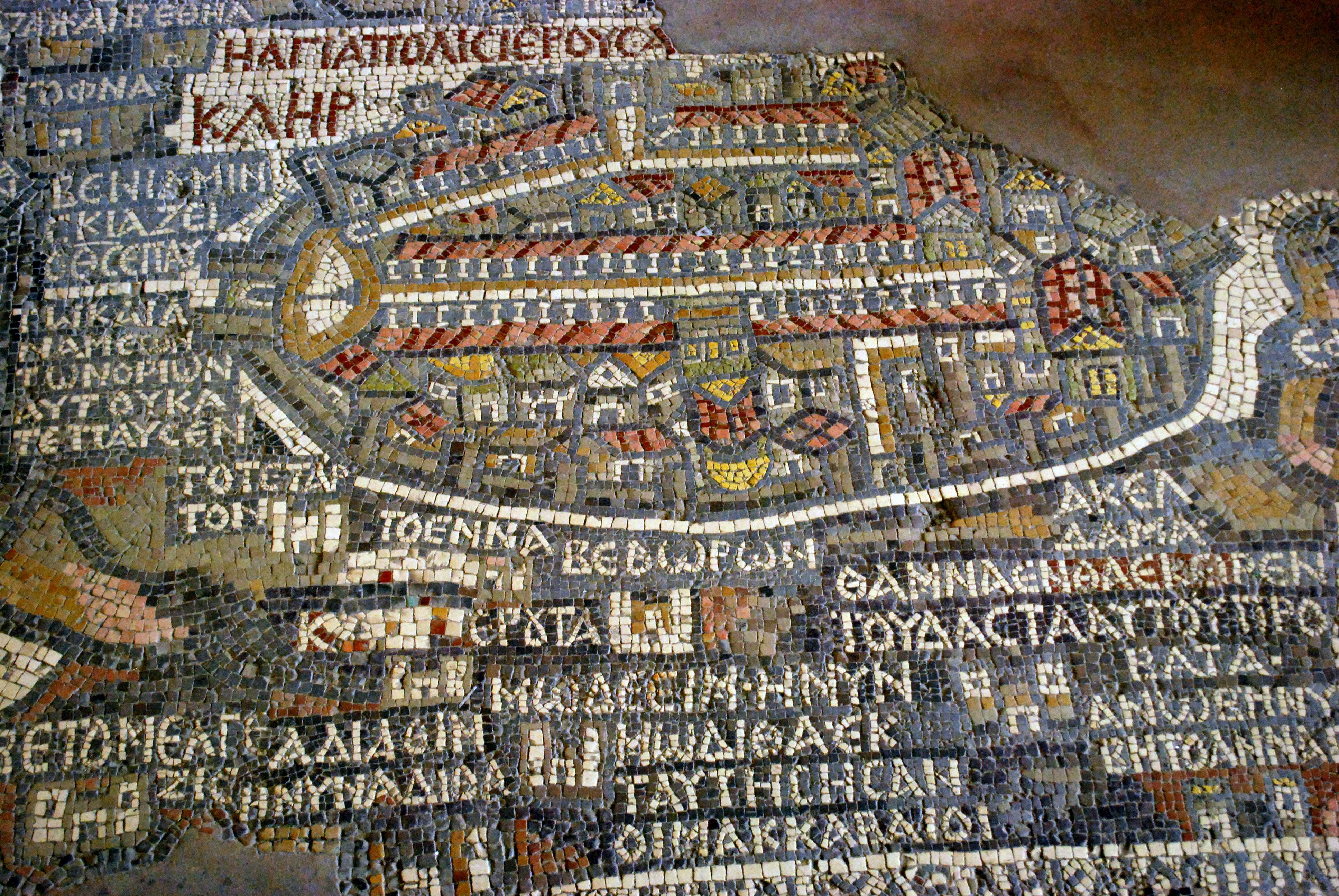 La carte de la Palestine, mosaïque du VIe siècle dans l'église Saint-Georges à Madaba (Jordanie) : détail de la zone de Jérusalem.